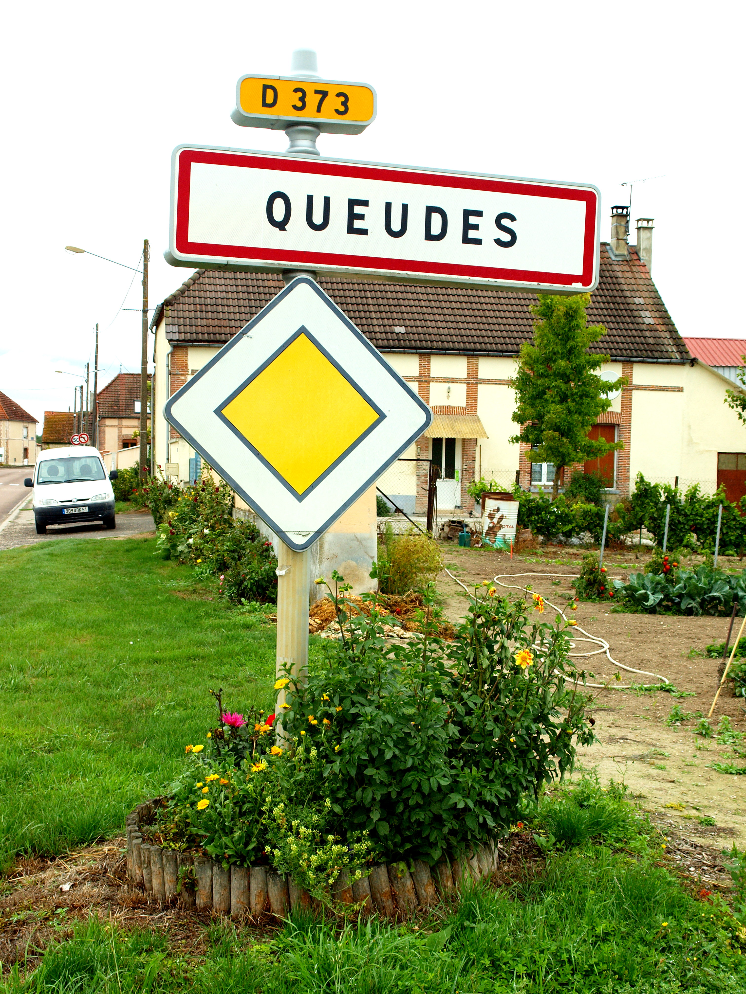 Queudes (Marne, France) : panneau d'agglomération.